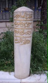 İdrisi Bitlisi Mezar Taşı-Eyüp